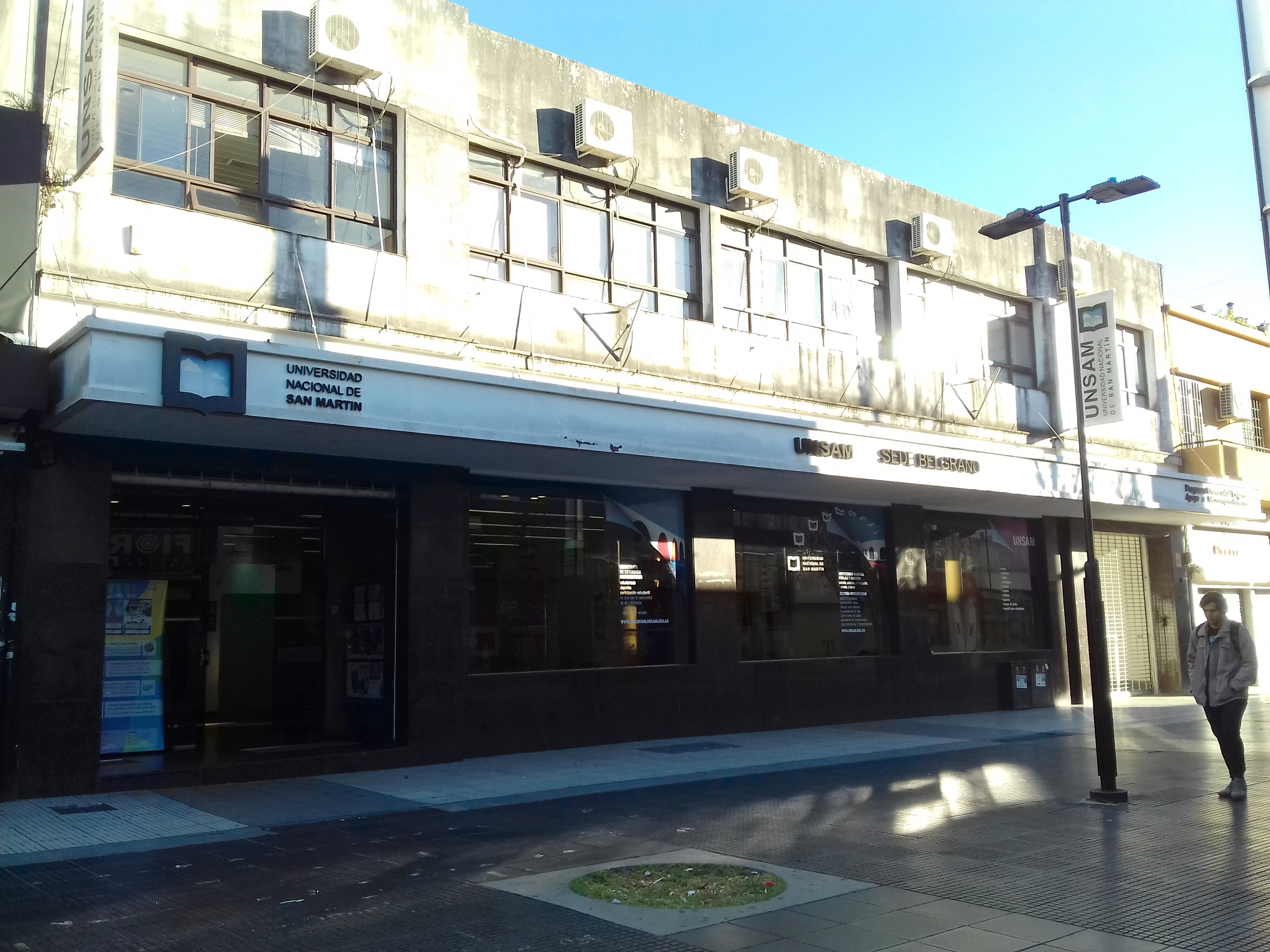 Universidad Nacional de San Martín UNSAM Sede Belgrano San Martín, provincia de Buenos Aires, Argentina.